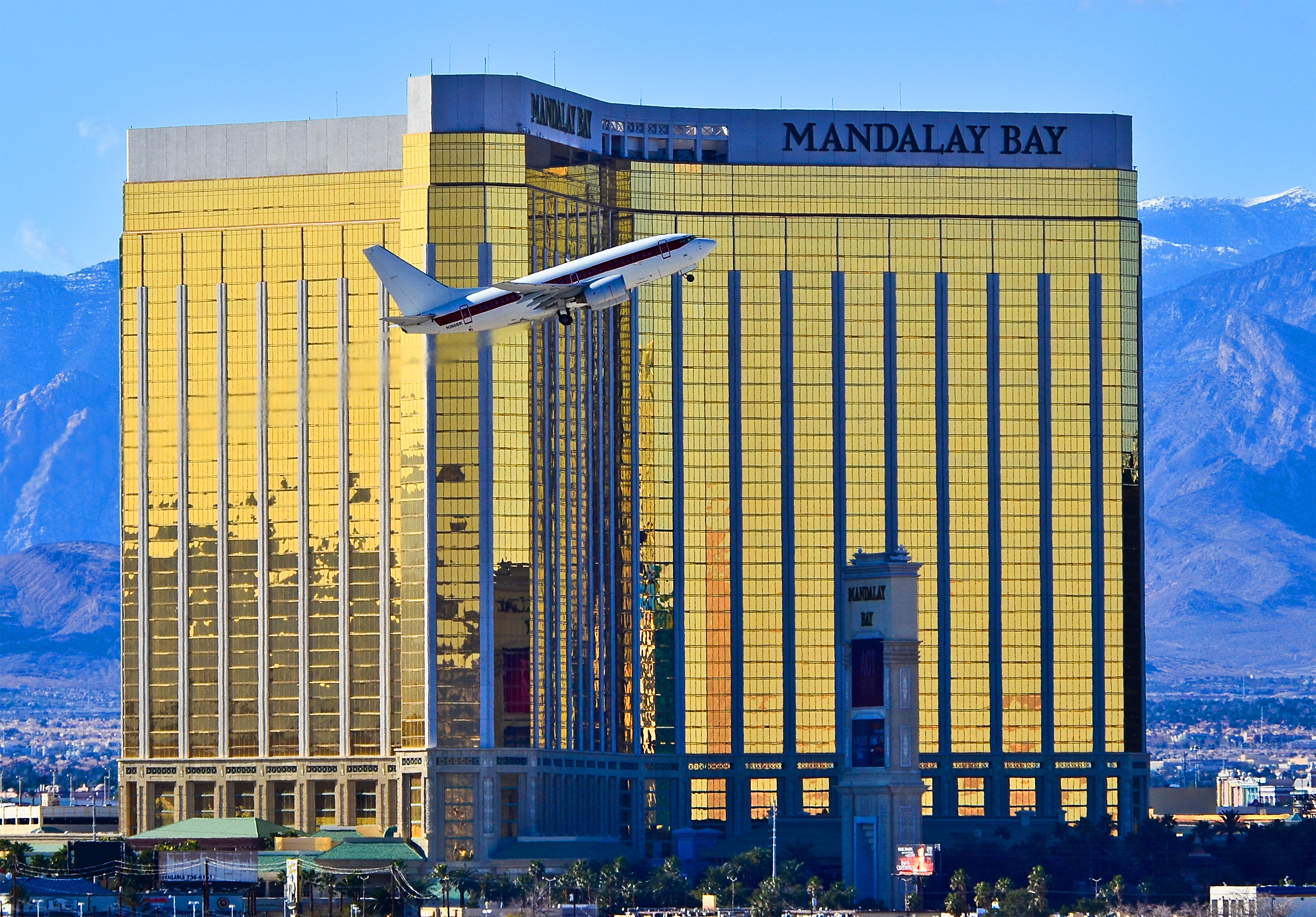 Las Vegas - McCarran International (LAS / KLAS) USA - Nevada, February 16, 2012 Photo: Tomás Del Coro